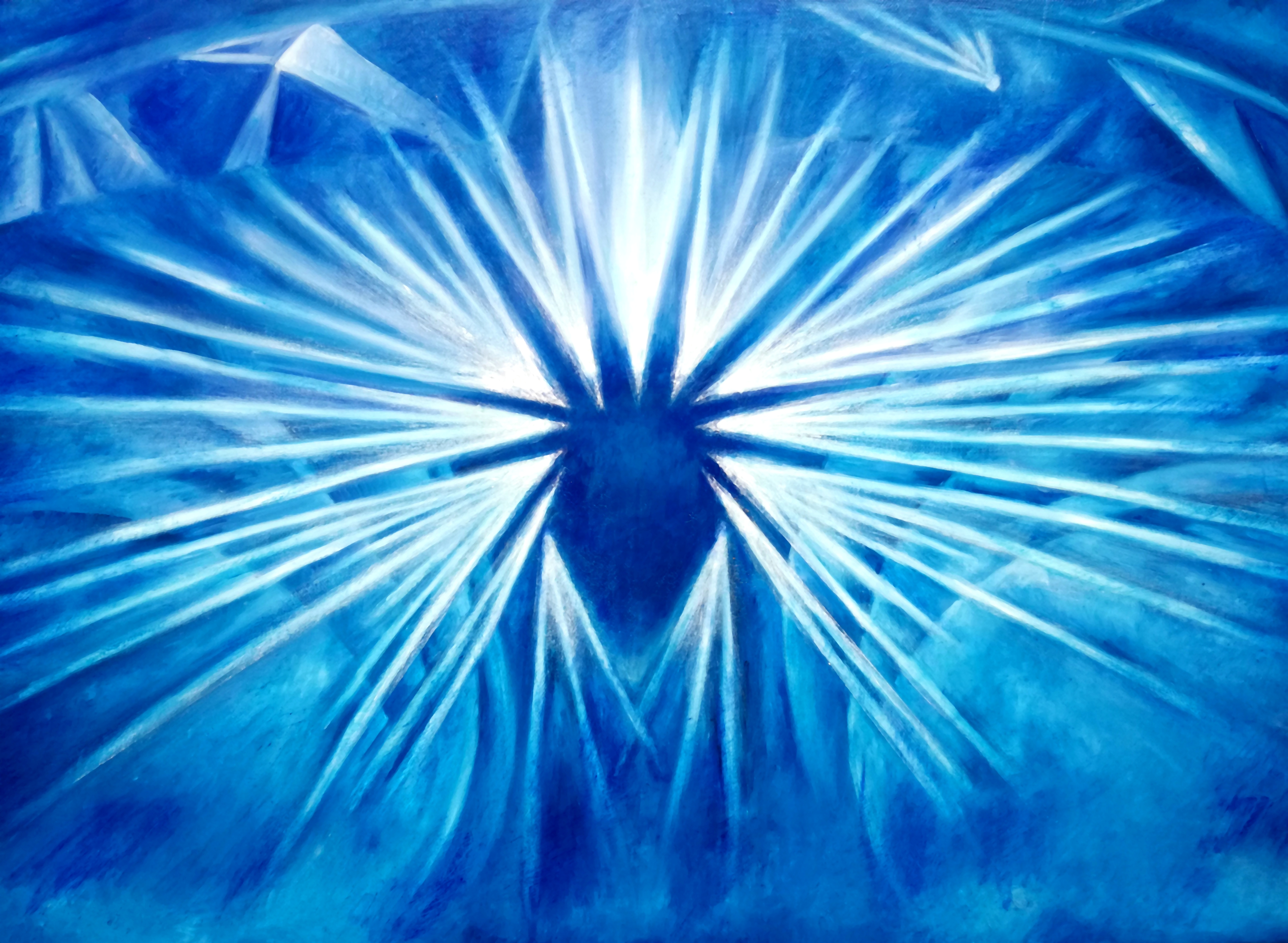 "Sapessi cos'è un'anima - almeno tu nell'universo", grattage - olio su tela, opera dell'artista Giovanni Guida, 2020